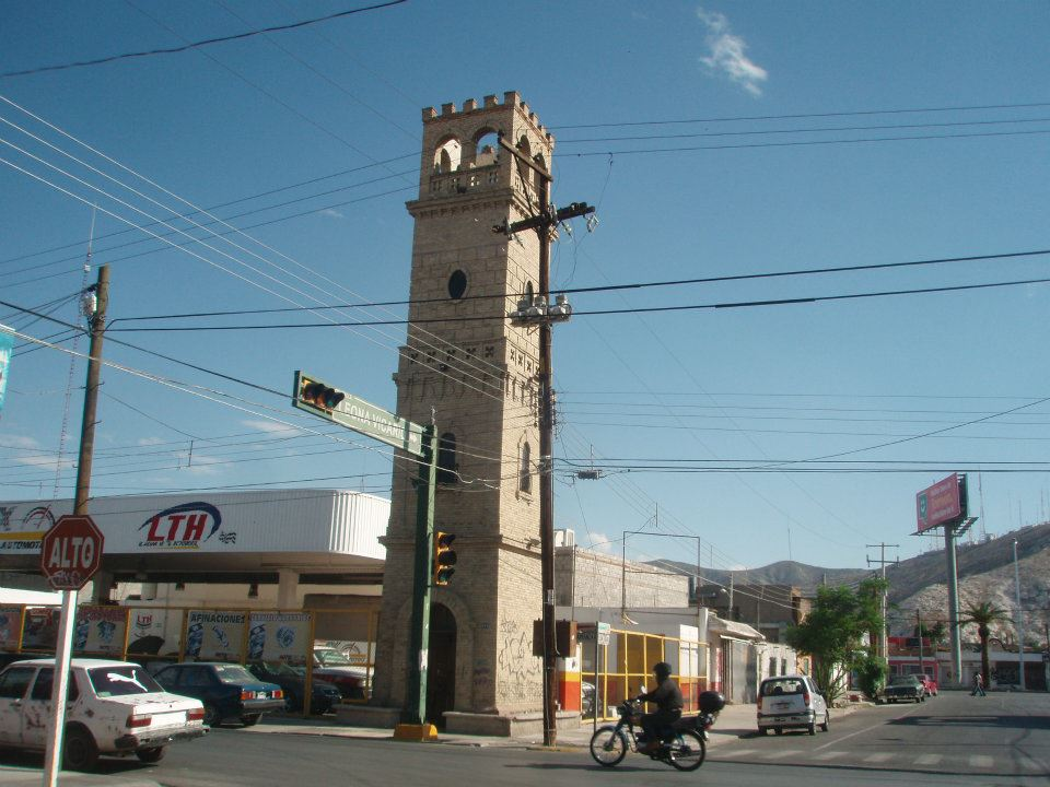 Último y único torreón en Torreón, ciudad del estado de Coahuila